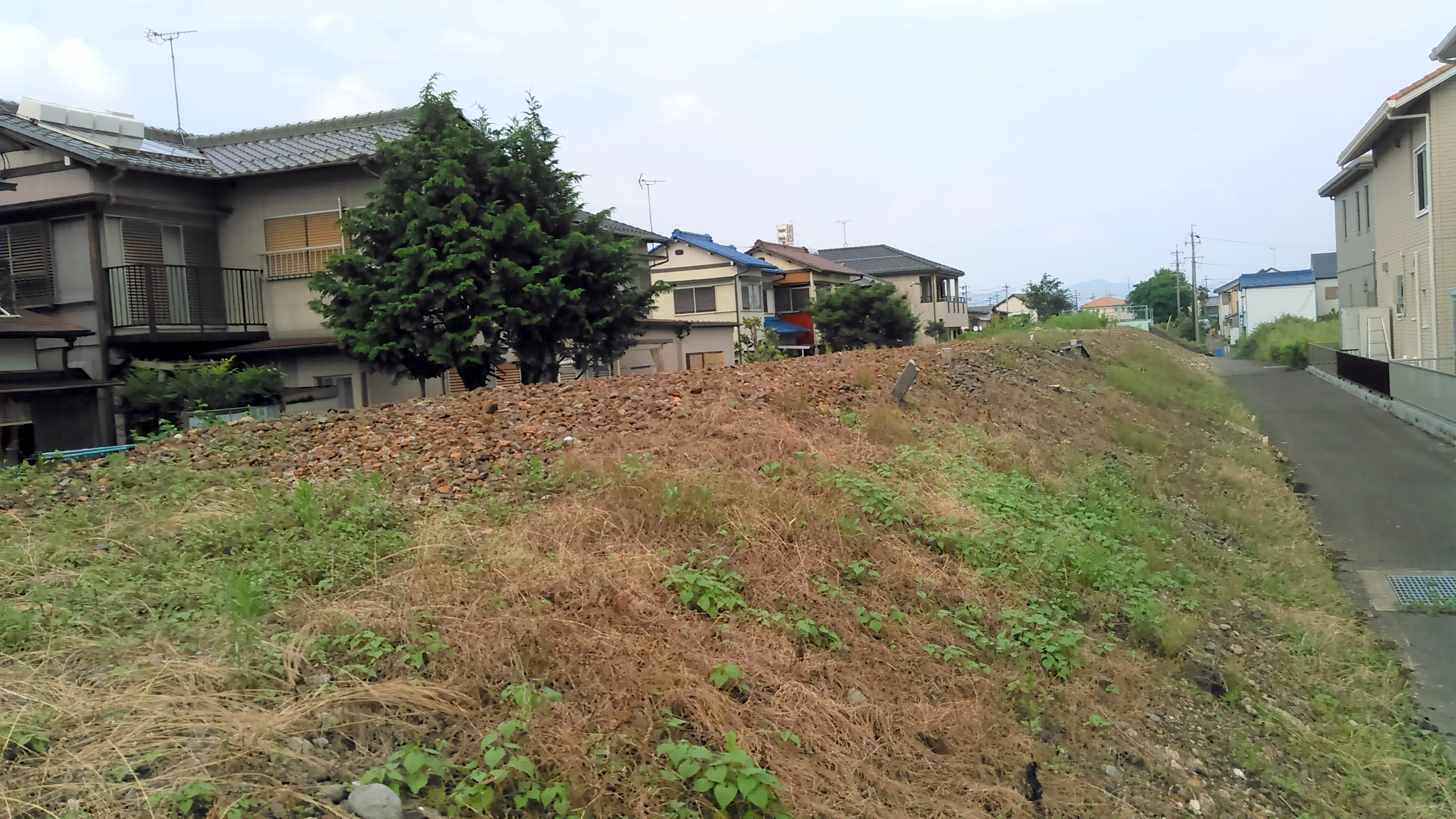 名鉄揖斐線、八ツ又駅跡地。旧版地形図の位置とに基づいて、撮影。 土手の階段から撮影。